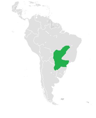 Карта поширення Mesoclemmys vanderhaegei